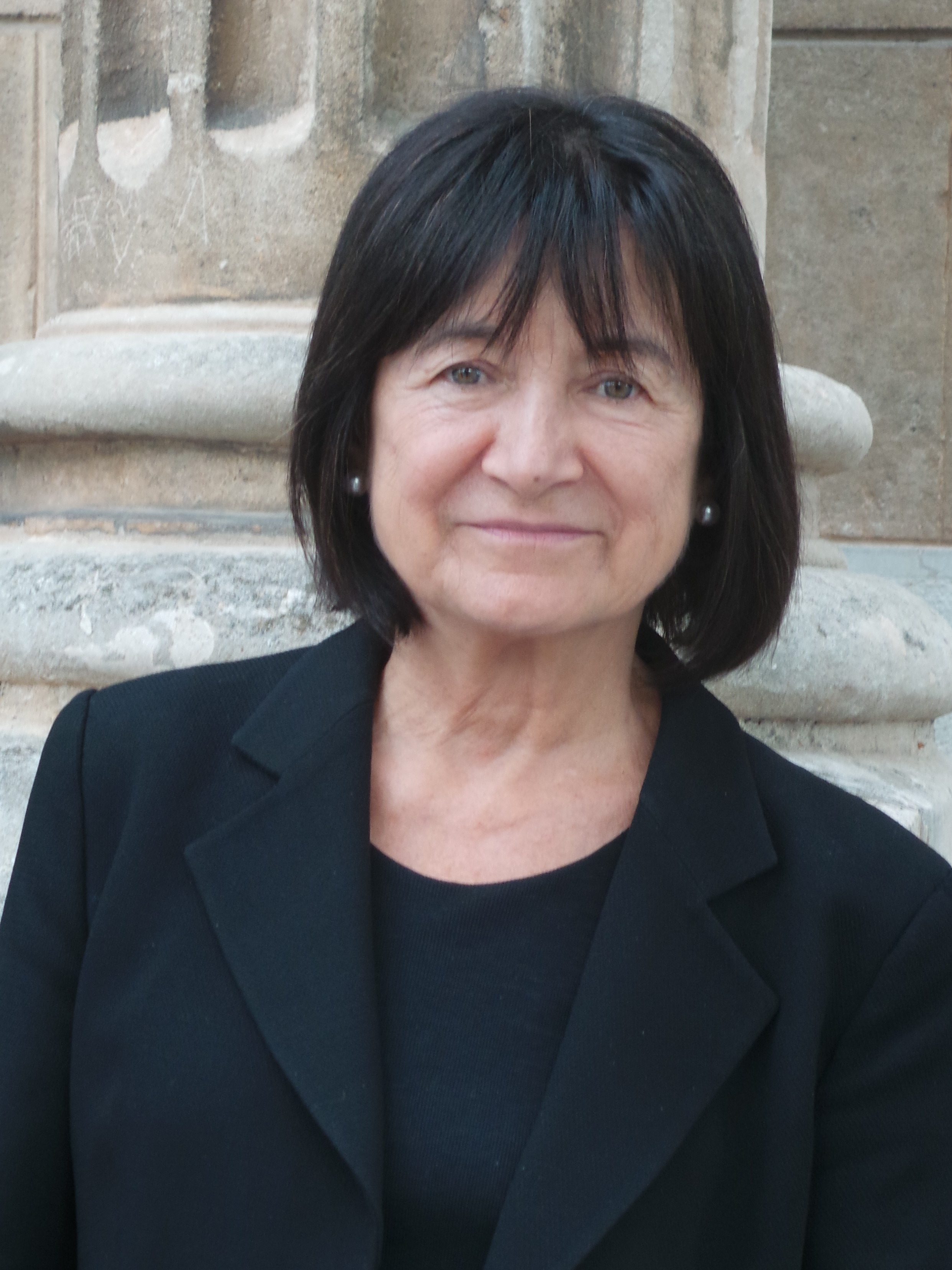 Palma de Mallorca 2015